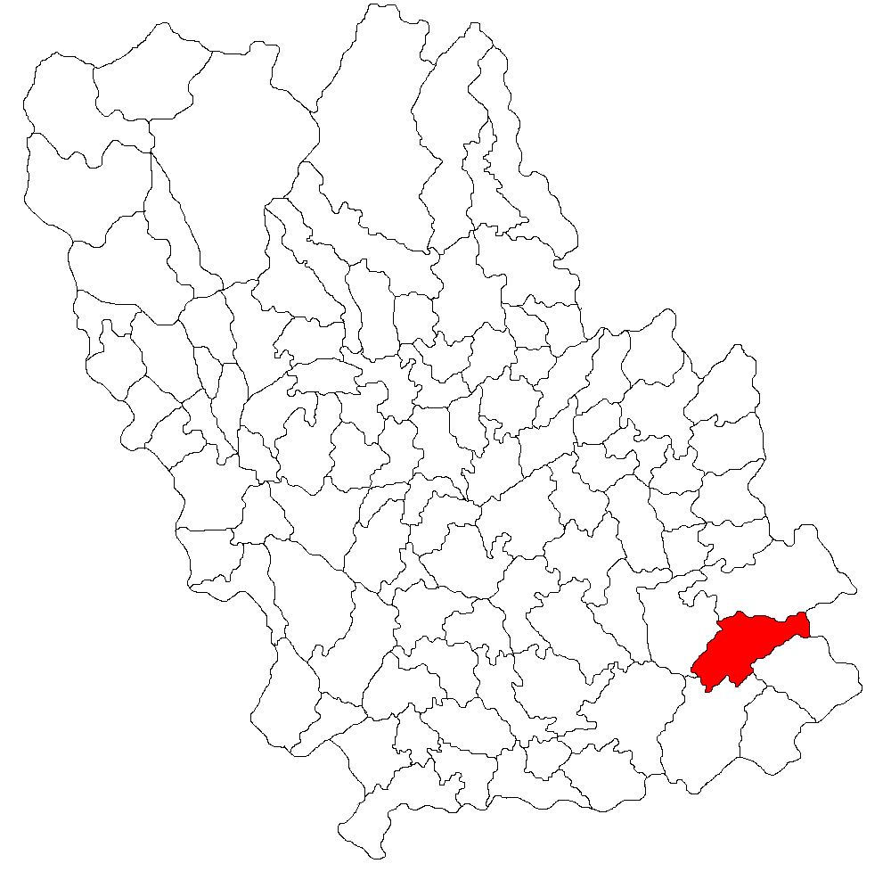 Categorie:Hărţi ale judeţului Prahova